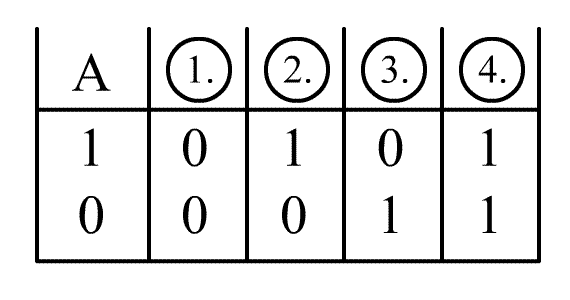 logische Verknüpfung - unär